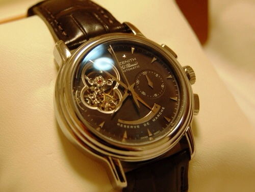 ゼニスクロノマスターTオープン。エルプリメロ搭載、毎時36000振動。